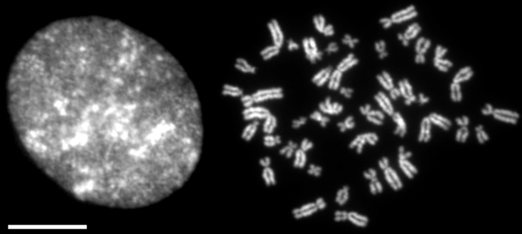 ヒト細胞の間期核（左）と分裂期染色体（右）。バーは10um。